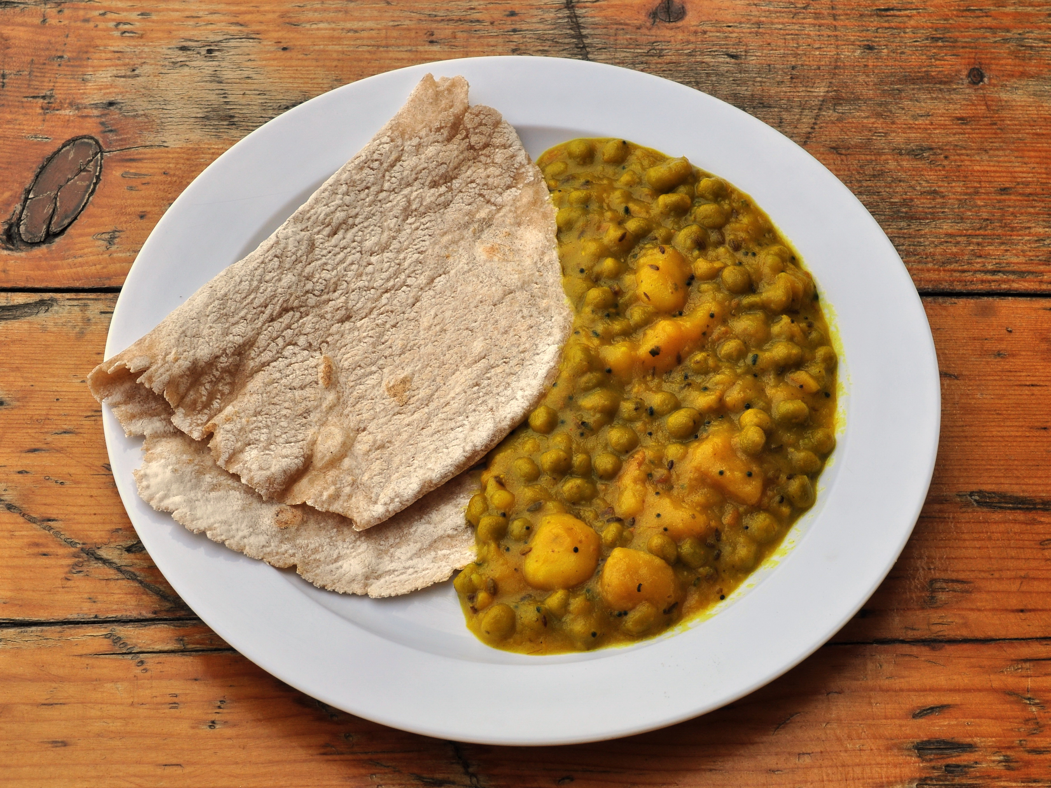 Chapati (Fladenbrot aus Ruchmehl) mit Kartoffel- und Erbsen-Curry, Theaterspektakel in Zürich-Wollishofen (Switzerland)